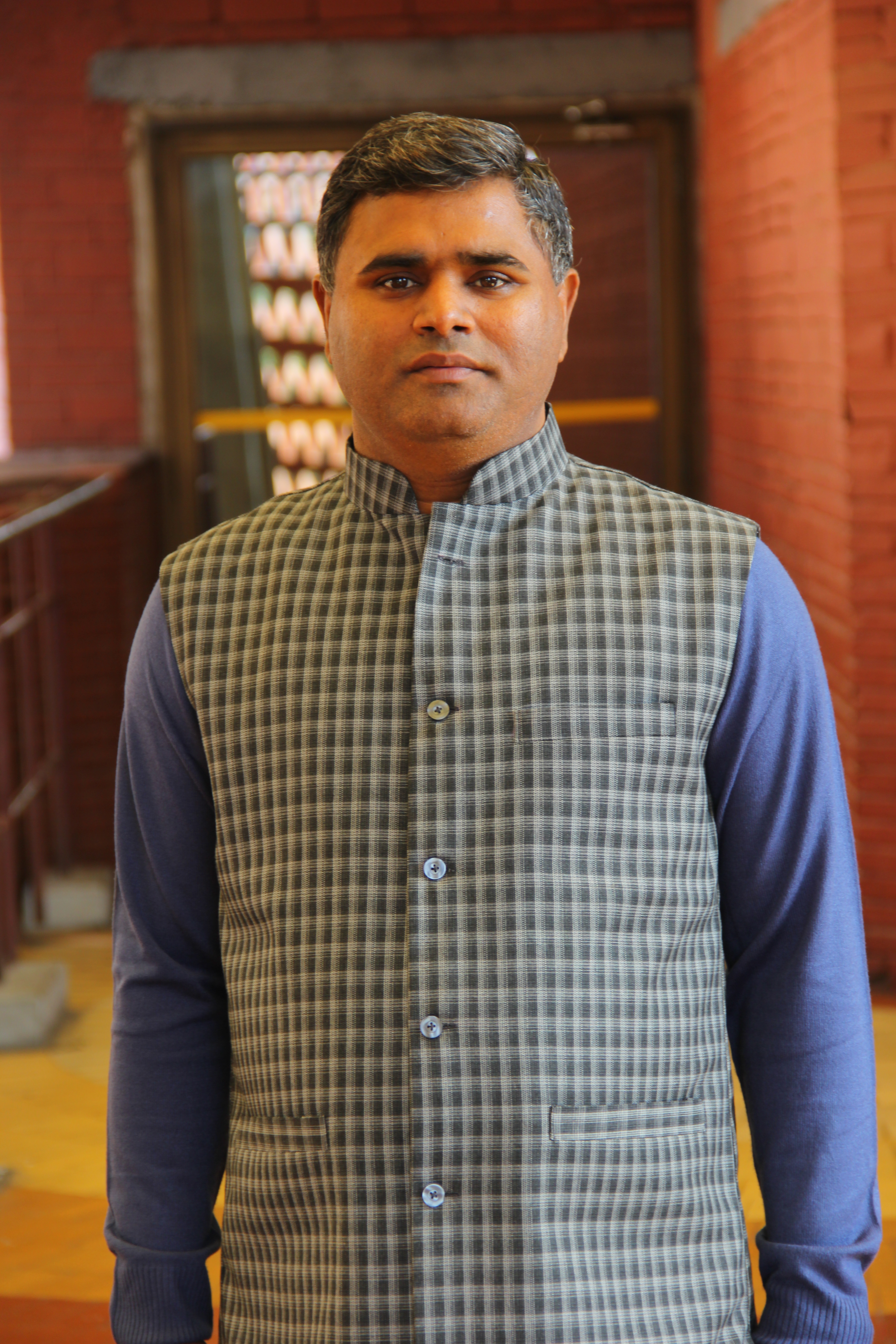 इंडिया हैबिटेट सेंटर में आयोजित एक कार्यक्रम में हरीश चन्द्र बर्णवाल